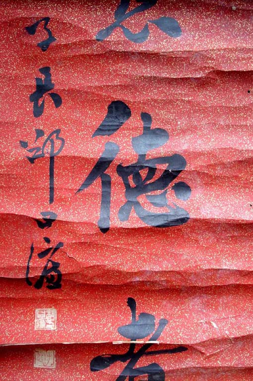 [清] 邵曰濂书法 墨；对联 来自：邵曰濂书法 原作为二维平面艺术（古画），作者逝世已逾百年，无特殊版权要求。